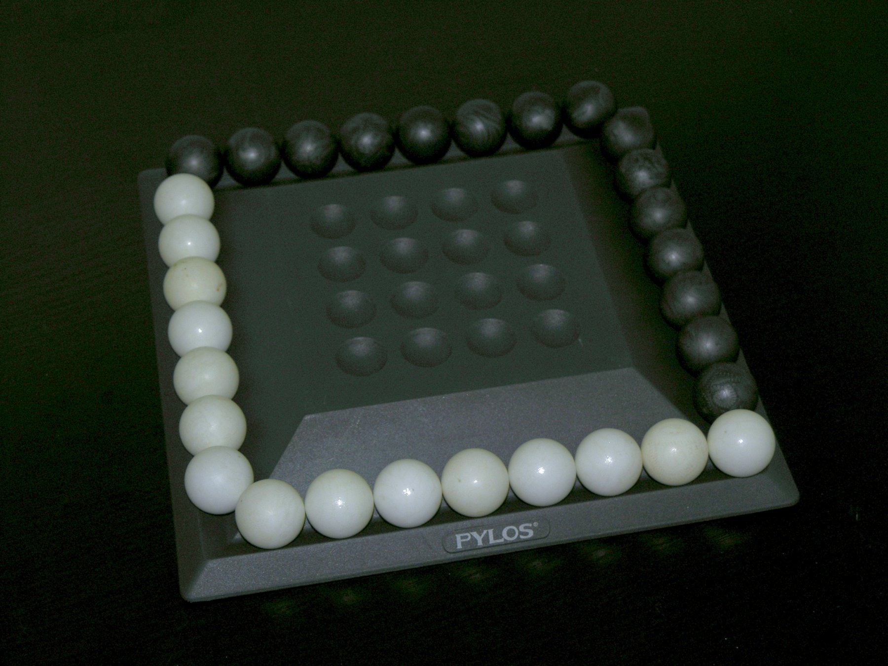 Pylos